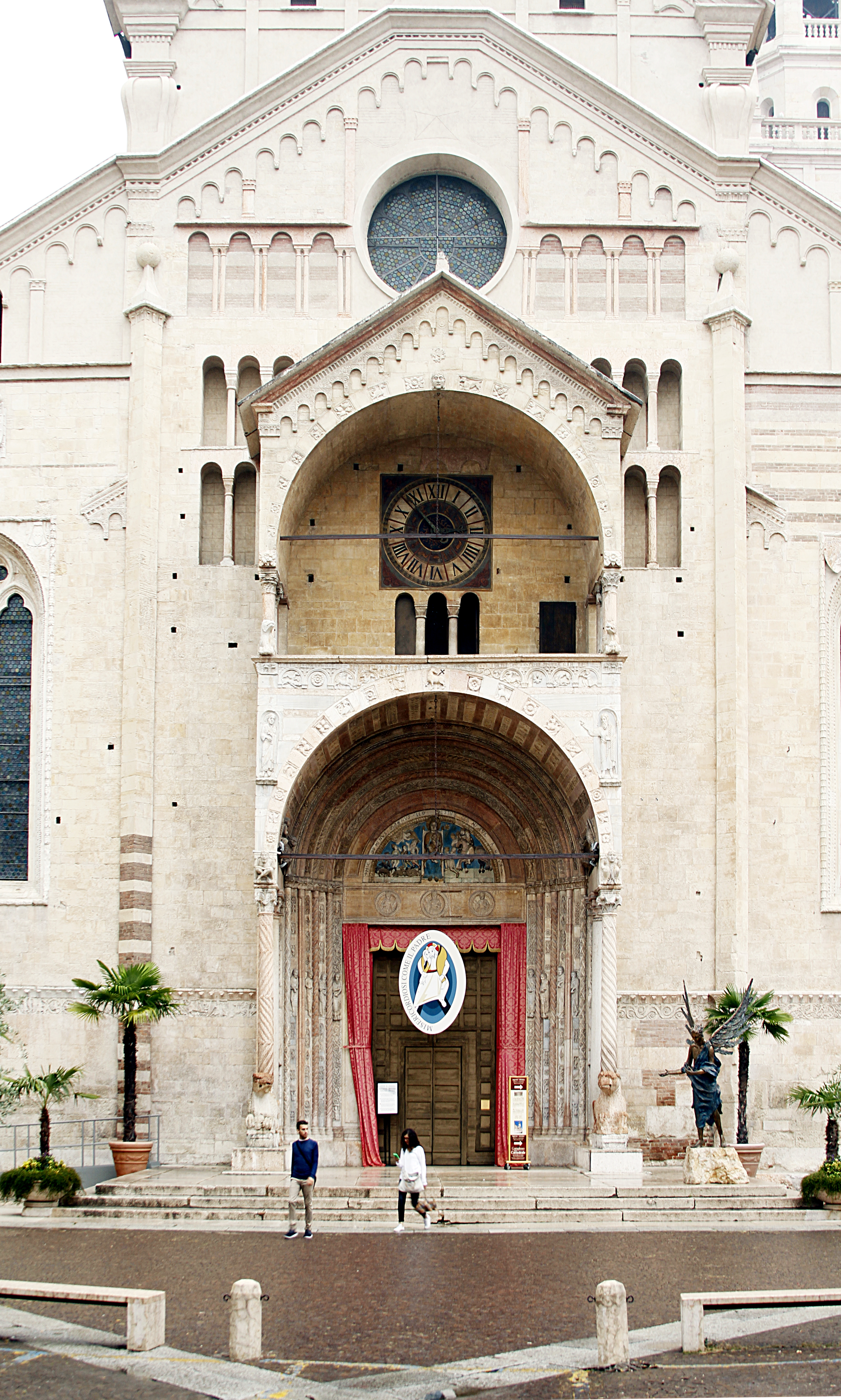 Duomo - Verona